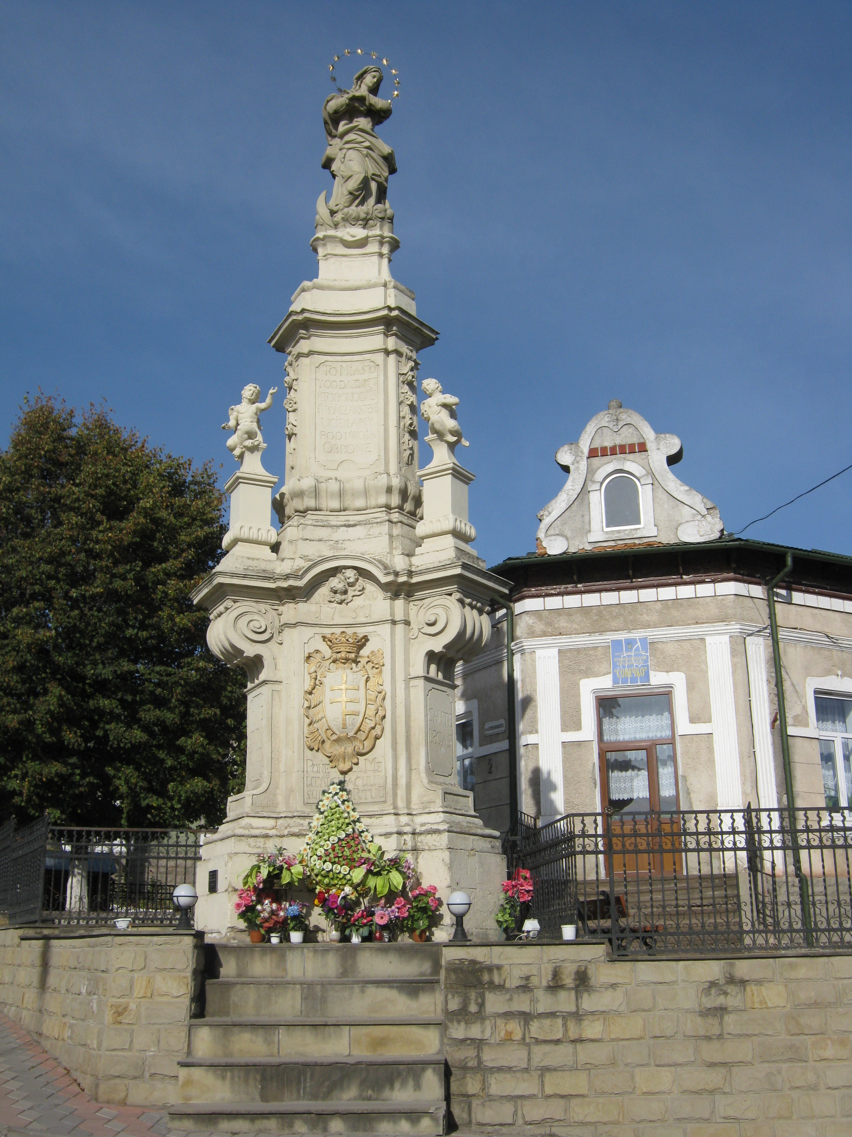 Йоган Георг Пінзель. Придорожній пам'ятник Непорочного Зачаття Пресвятої Богородиці (іноді св. Анни), Бучач; автор копії статуї - Роман Вільгушинський